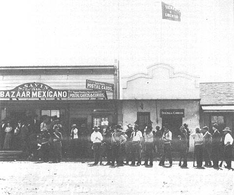 Soldados rebeldes magonistas que tomaron la ciudad de Tijuana en 1911.